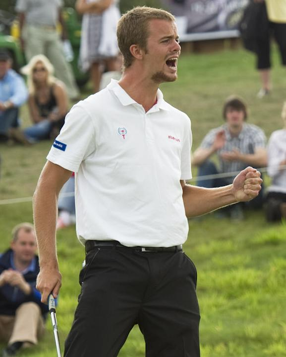 Andreas_Hartoe wint ECCO Tour Kampioenschap